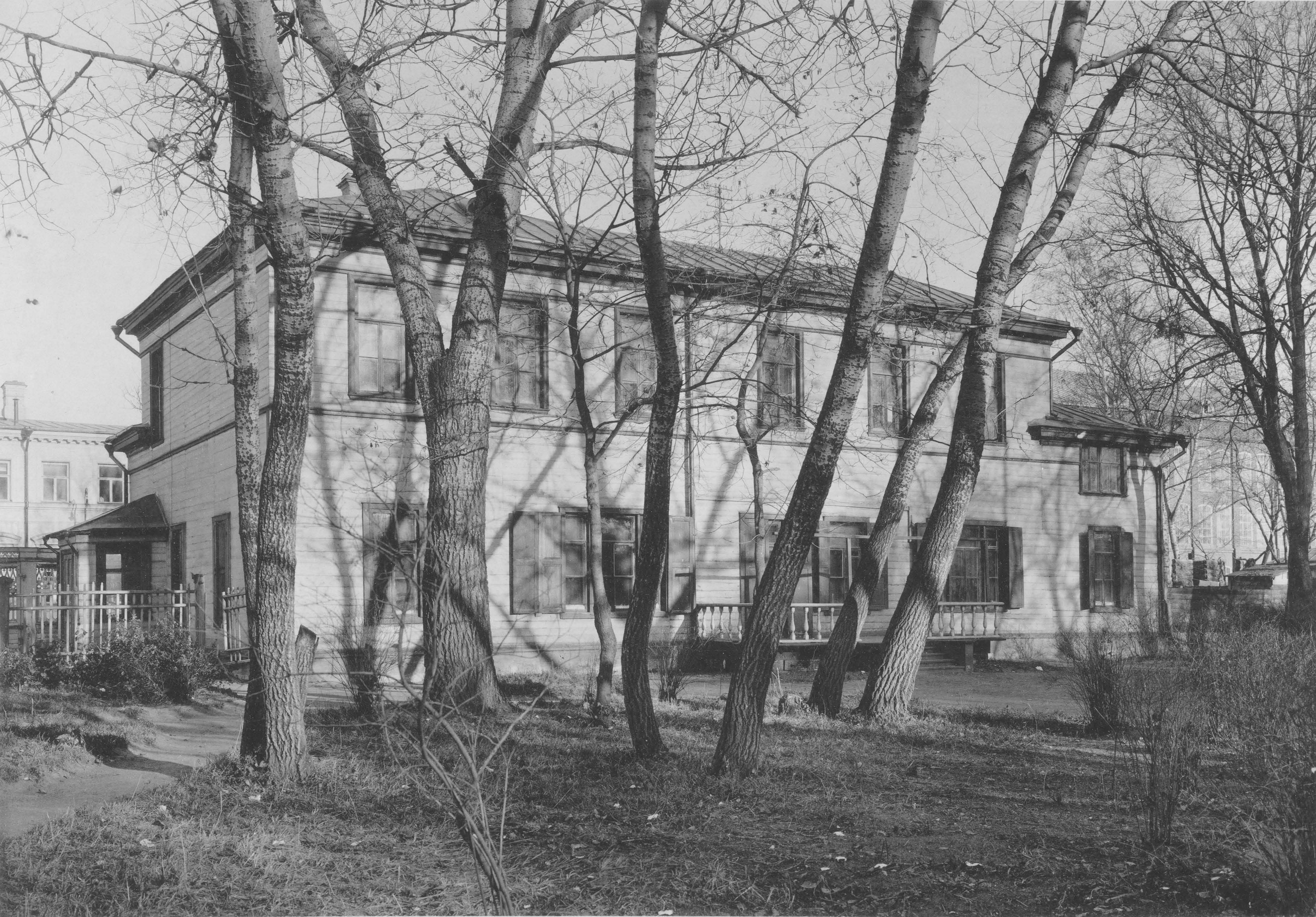 52. Домъ графа Л. Н. Толстого, прiобрЪтенный городомъ. Видъ изъ сада. (Москва)